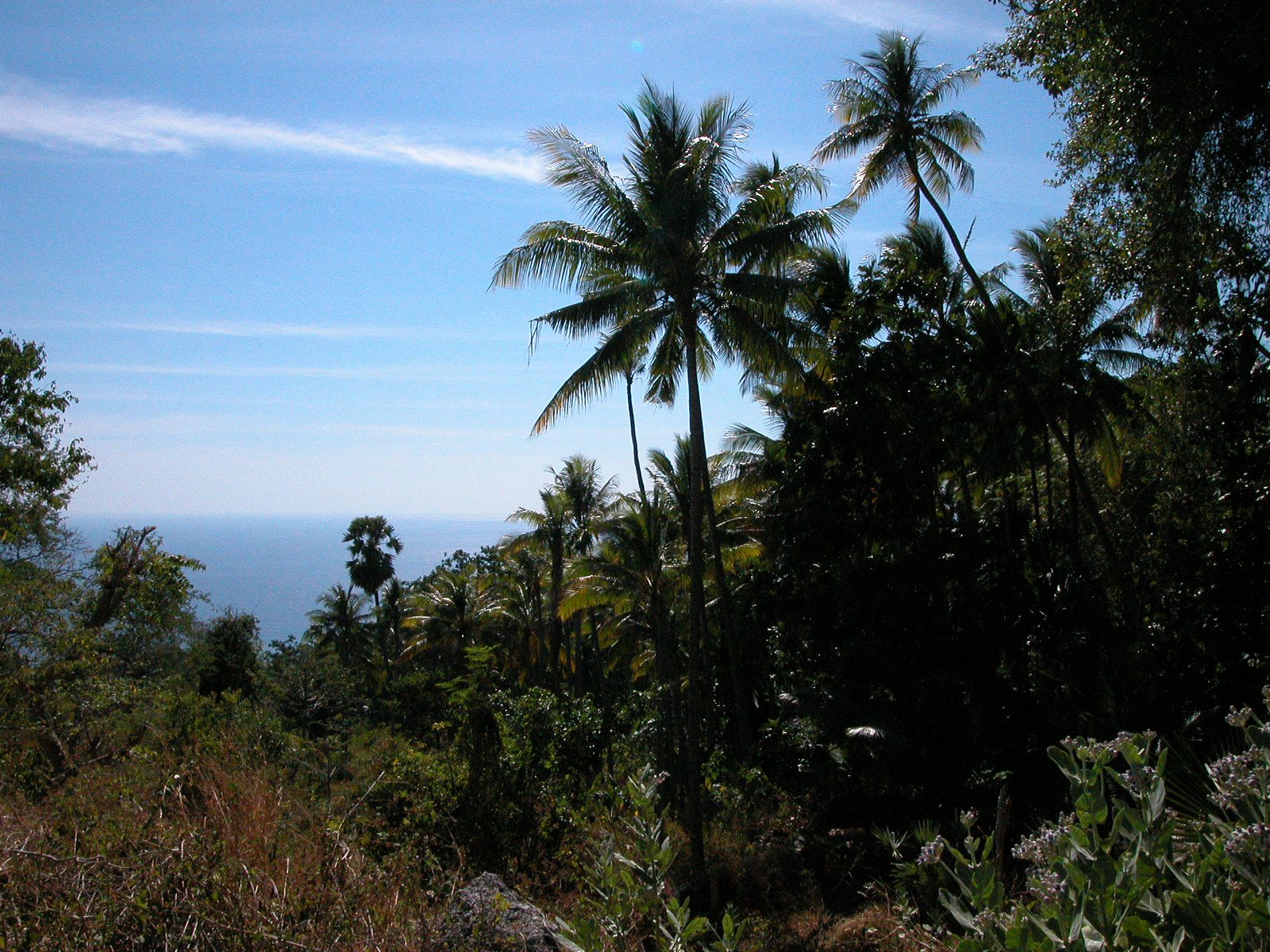 Landschaft in Osttimor